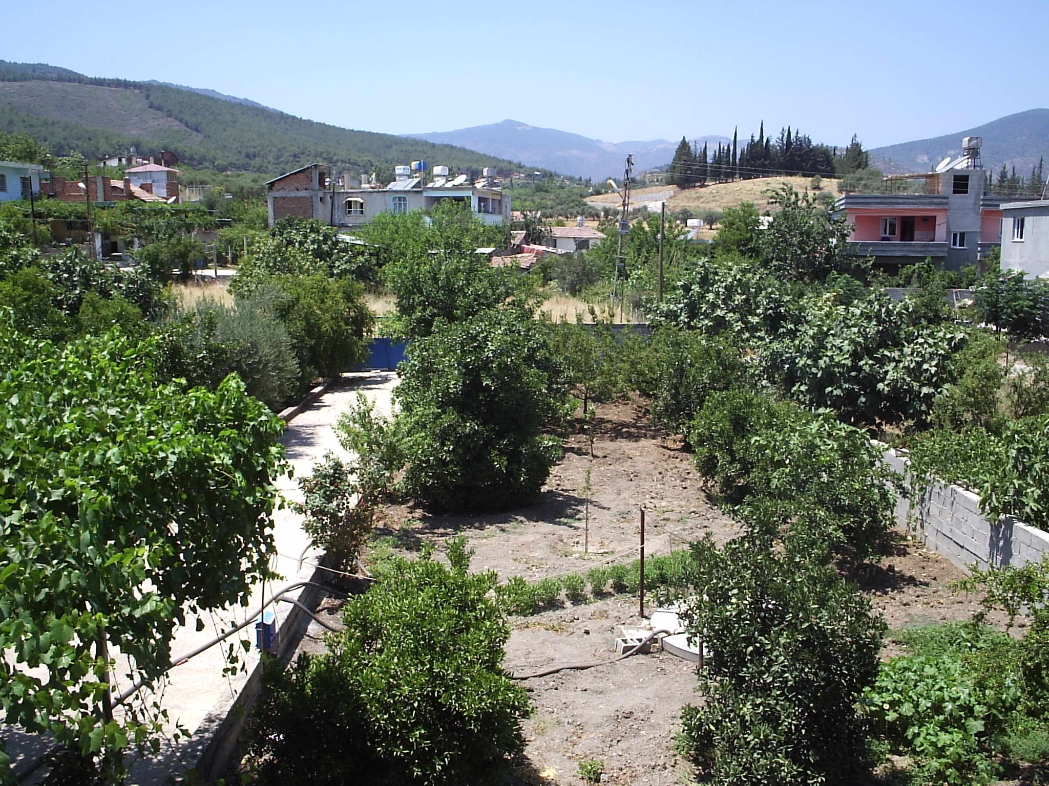 Fotoğrafı çeken: Necati ALKAN